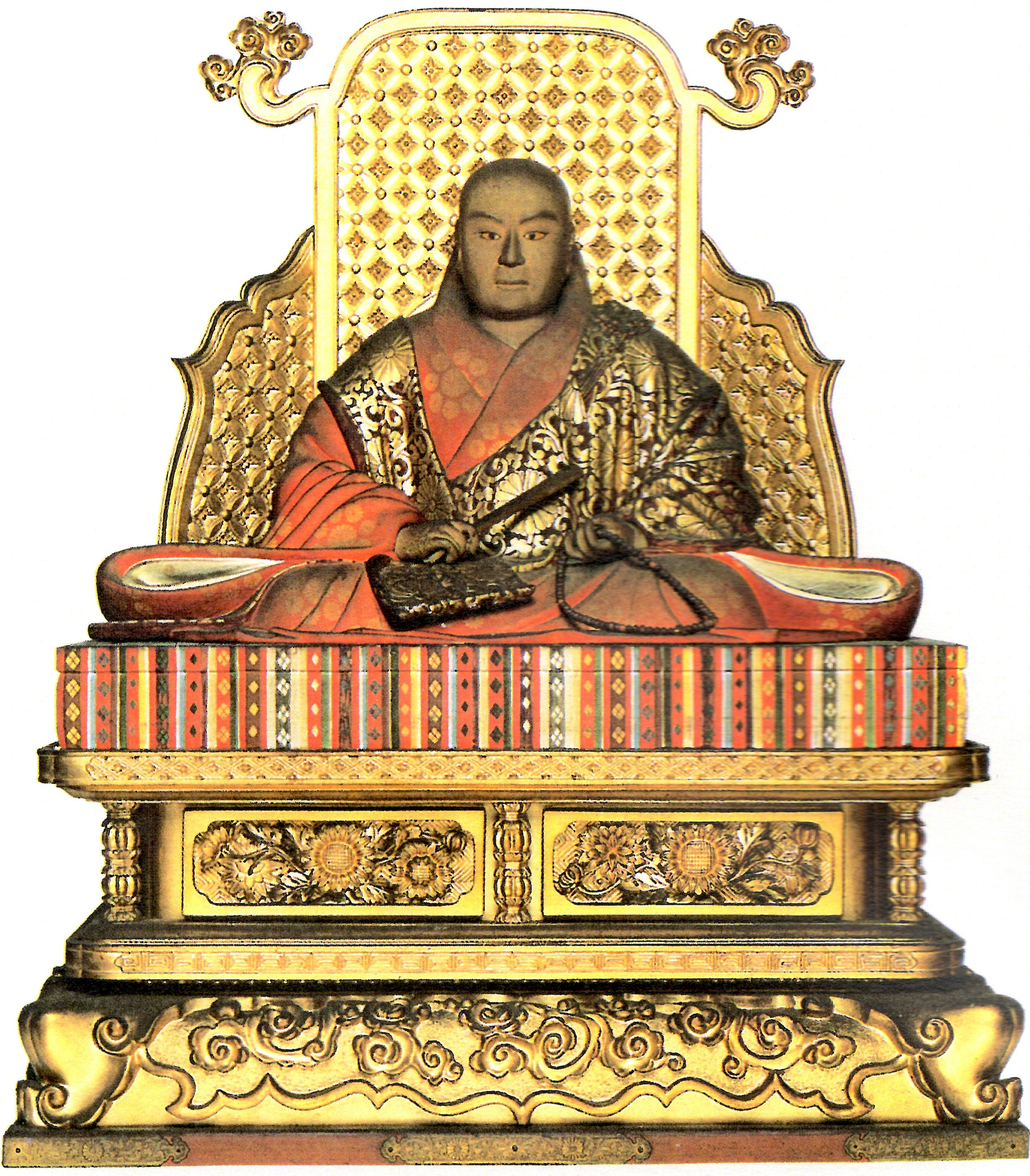 公弁法親王の木像。